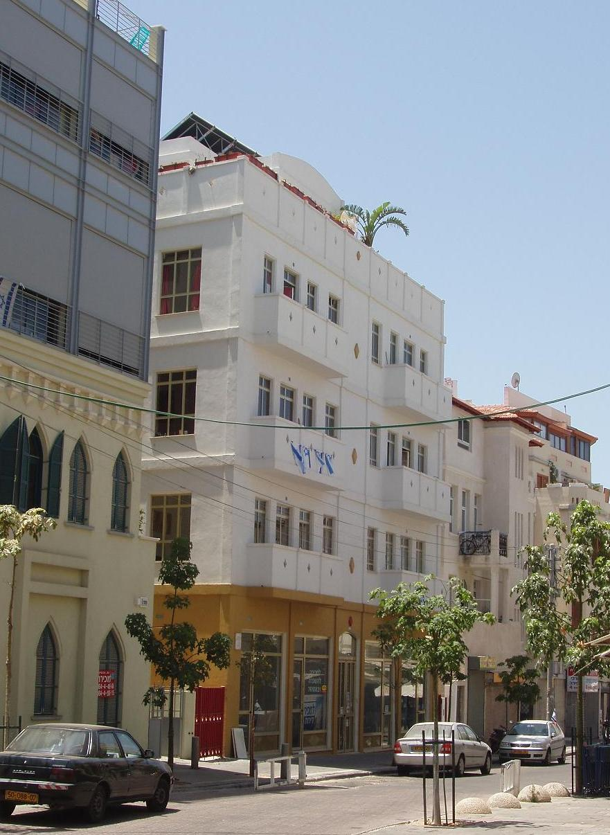 בניין בתל אביב בתכנונה של נילי פורטוגלי. צילם דוד שי.